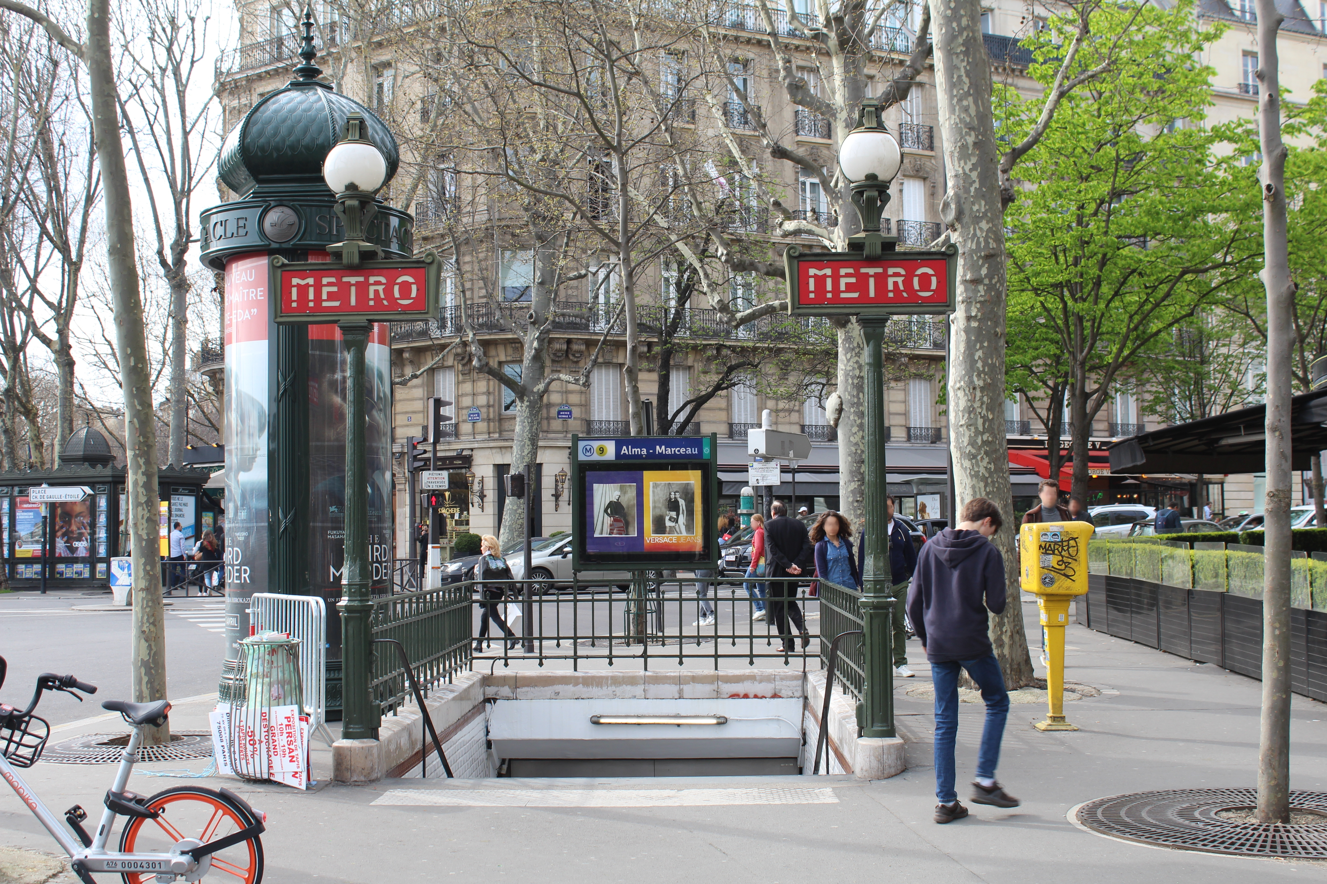 Entrée dans la station de métro Alma-Marceau, Paris.